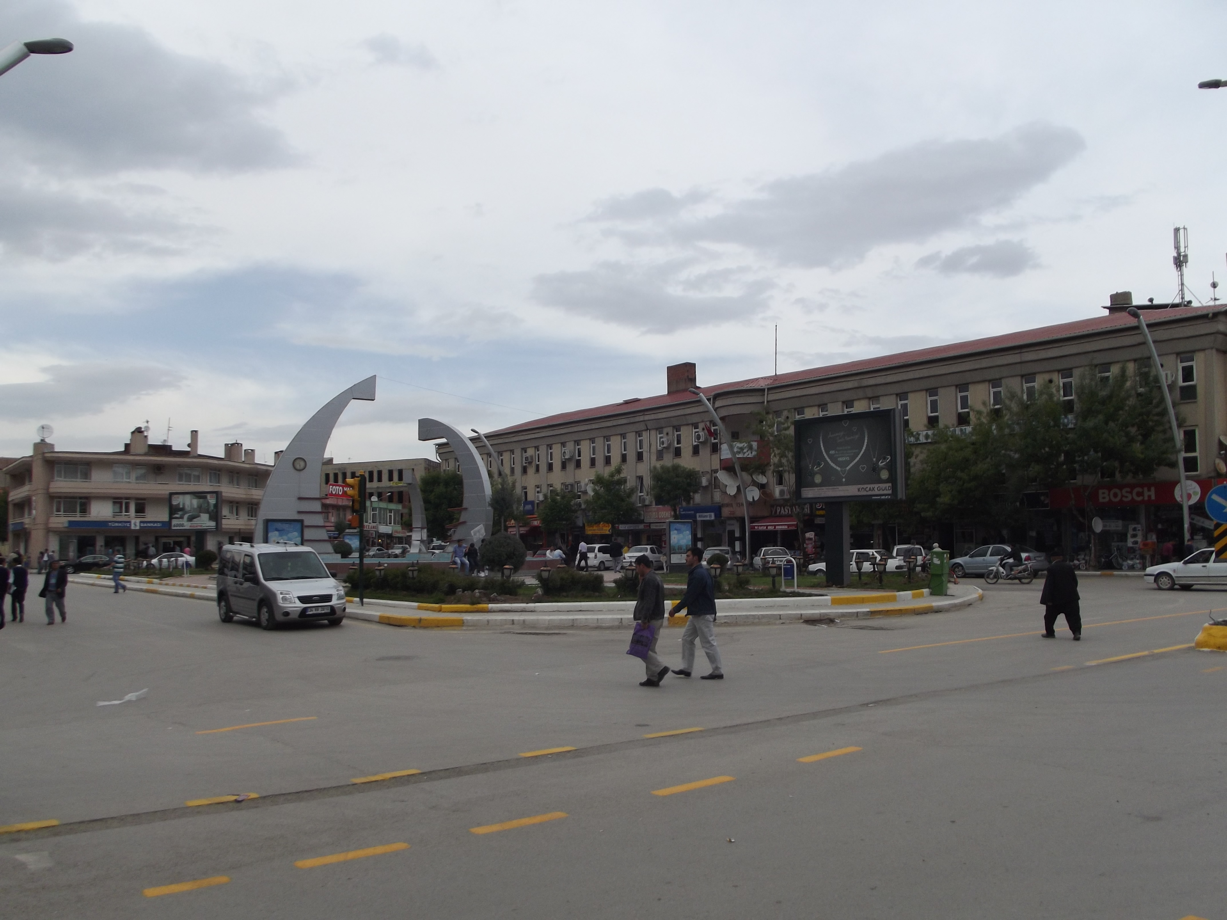 ELBİSTAN